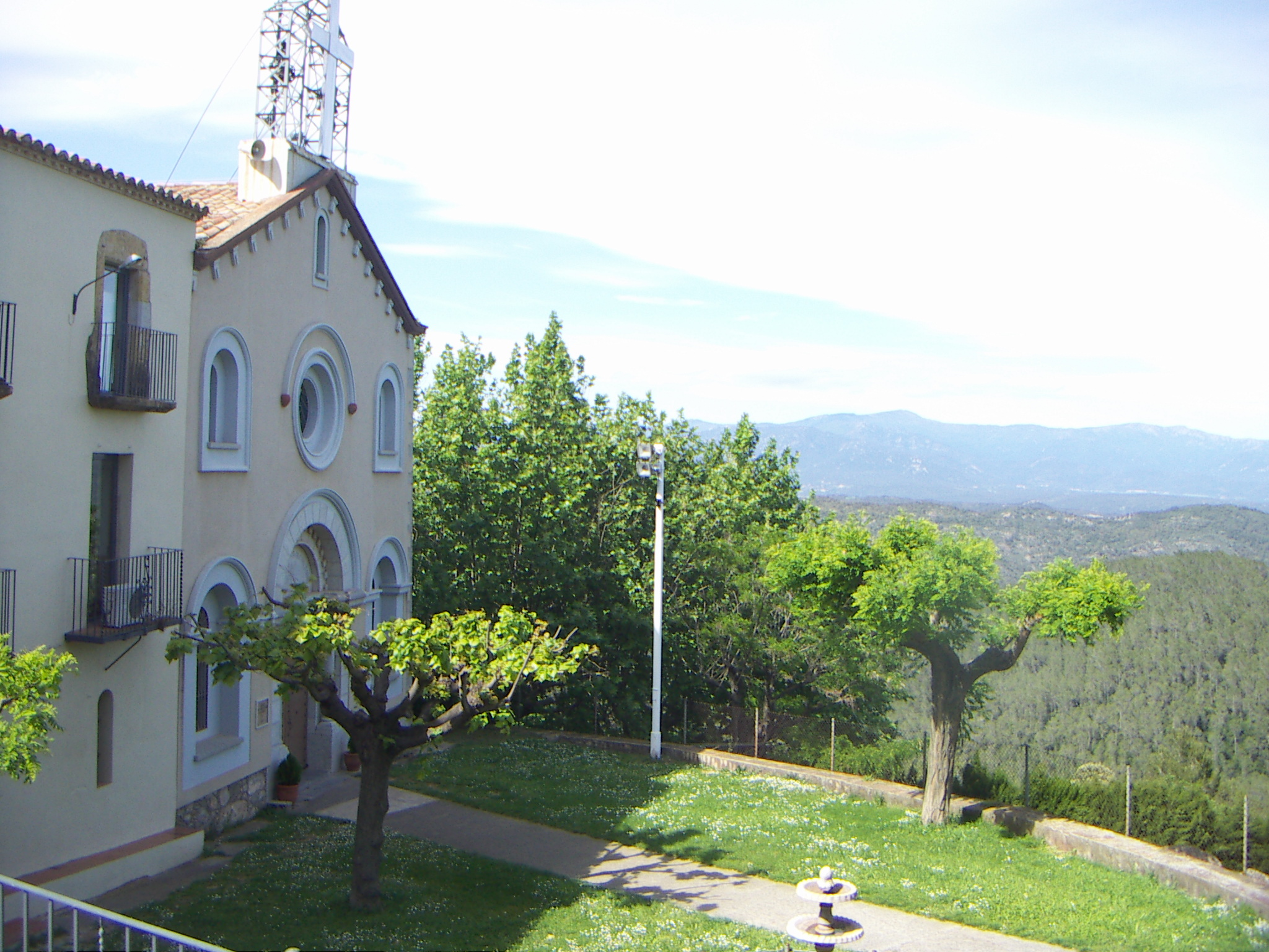 Santuari de la Salut de Terrades al capvespre de maig